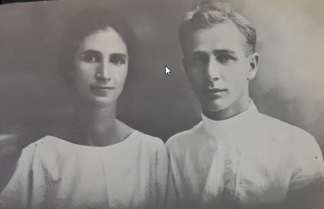 חנה קצנלסון וזיגמונד אדלר-נשר לאחר נישואיהם 1923